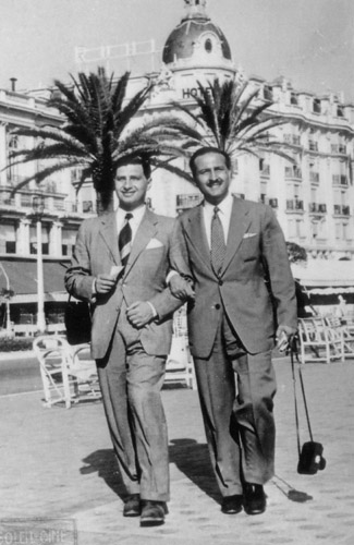 التاجر اليهودي السير نعيم الياهو دنكور 1914- 2015